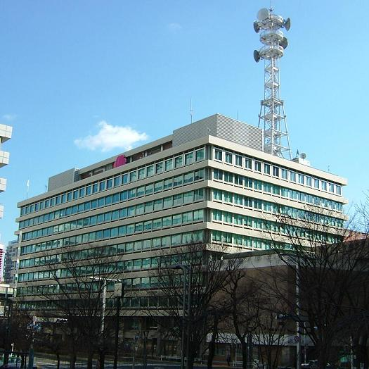 名古屋市東区東新町に所在する中部電力本店（本社）。 投稿者 Gnsin 撮影日&場所 2005年1月13日(木) 名古屋市東区の栄公園にて撮影。